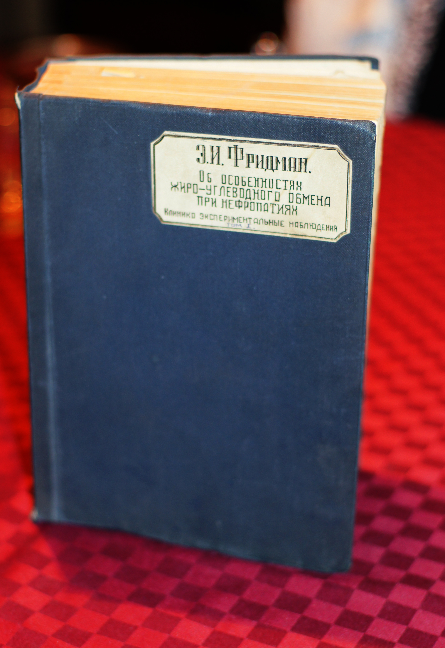 Диссертация профессора Эммануила Иосифовича Фридмана